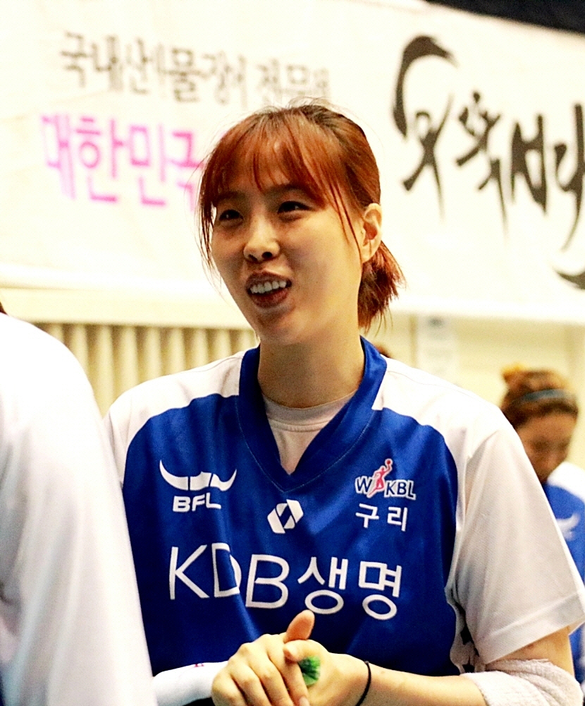 160220 여자농구 KDB생명 vs KB스타즈 직찍